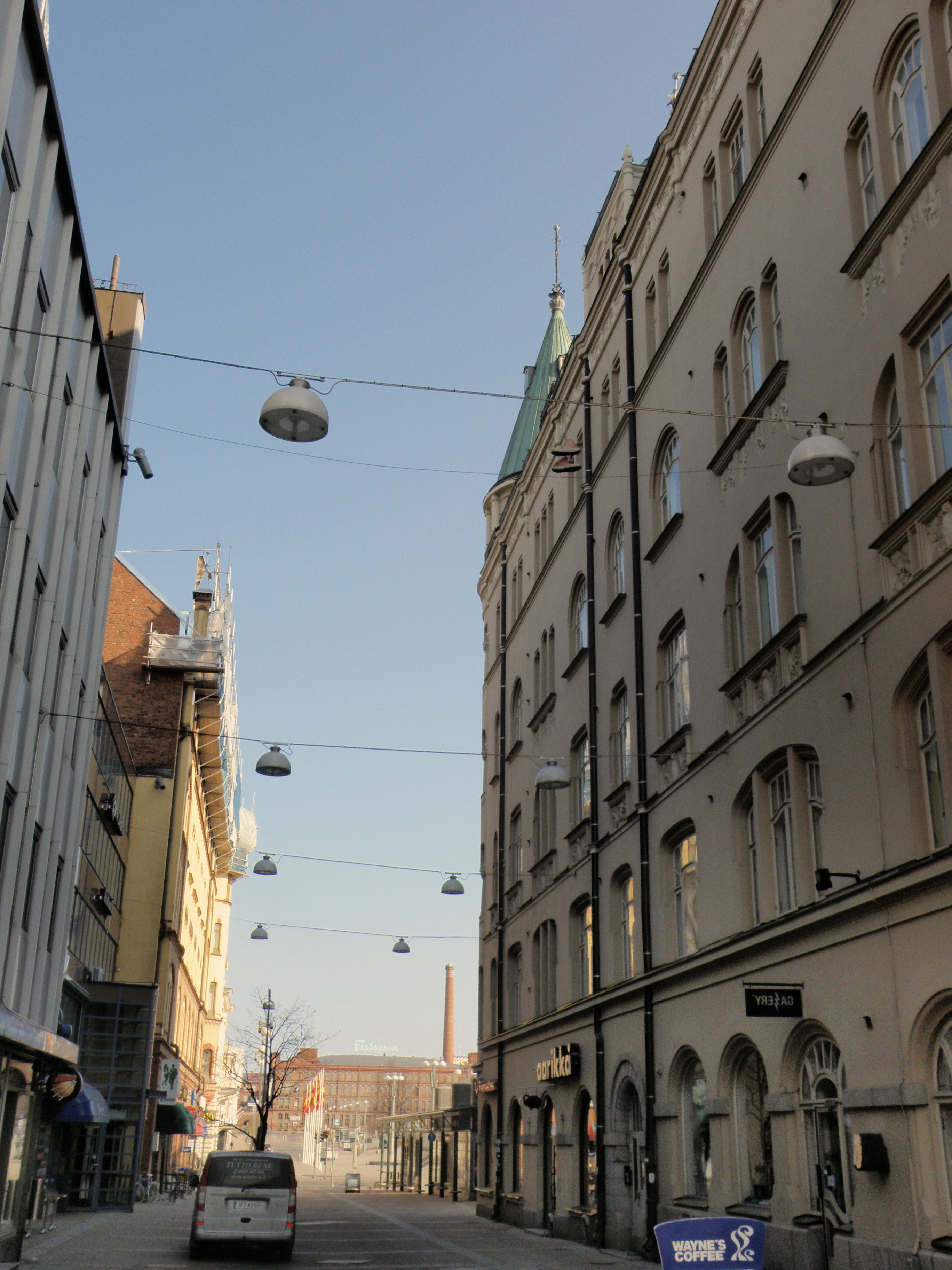 Aleksis Kiven katu